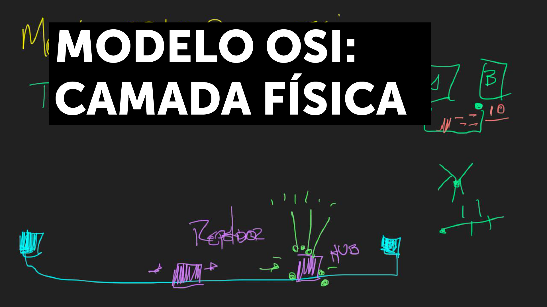 Modelo OSI - Camada Física